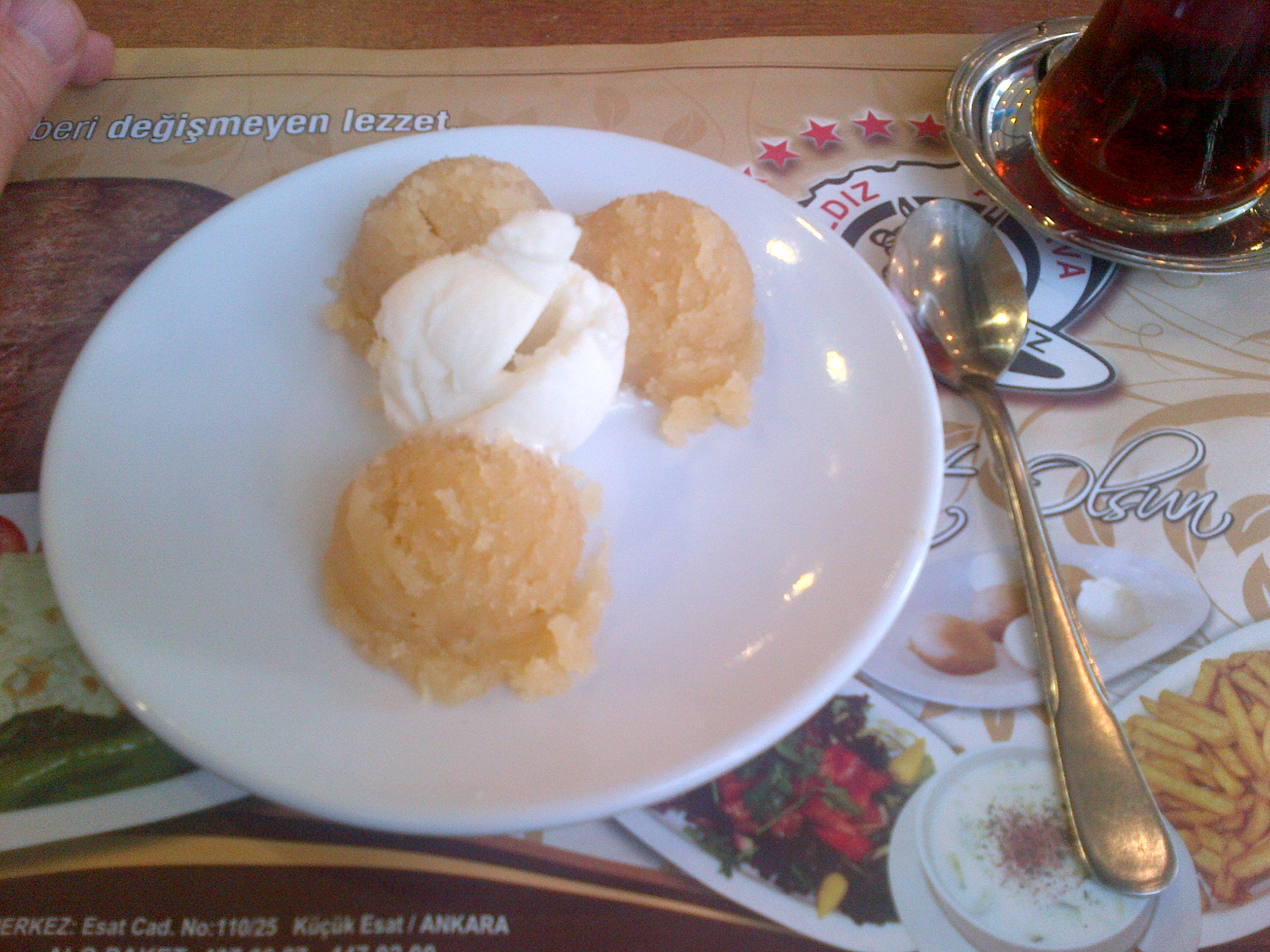 Irmik helvası, un postre de semolina, de la cocina turca.